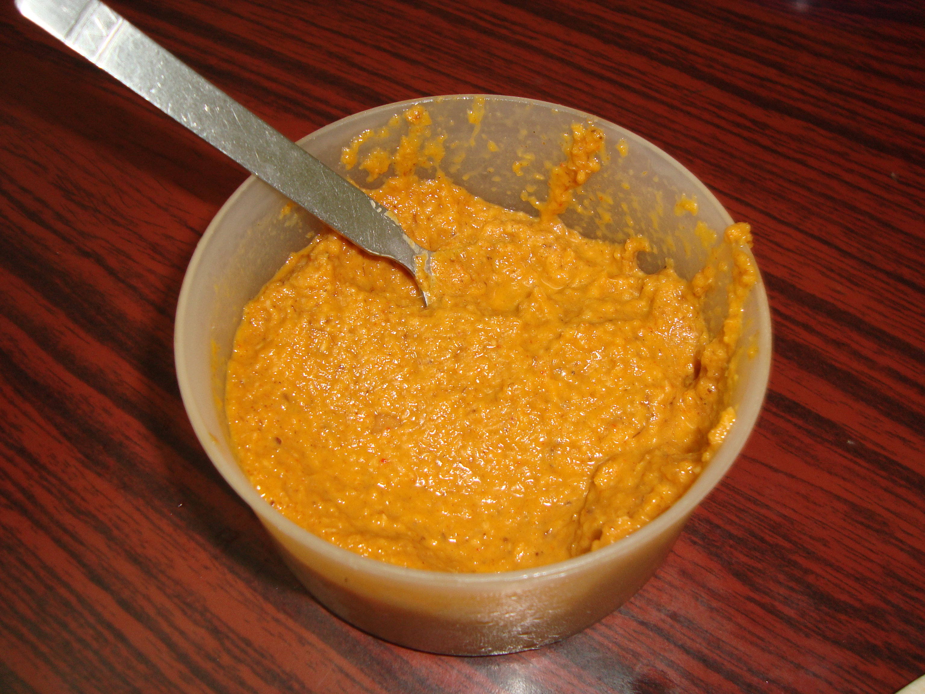 ചമ്മന്തി